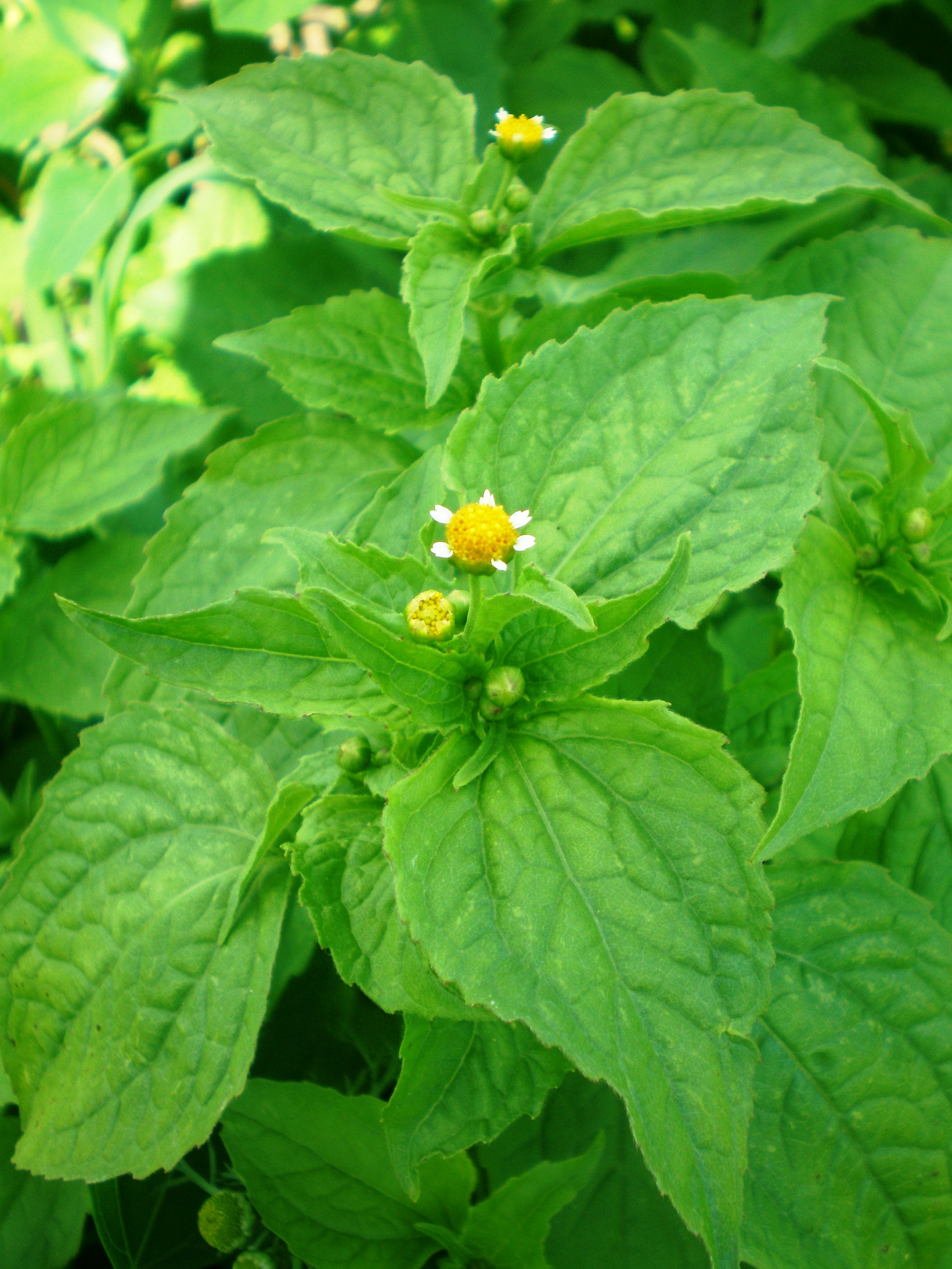 Galinsoga parviflora